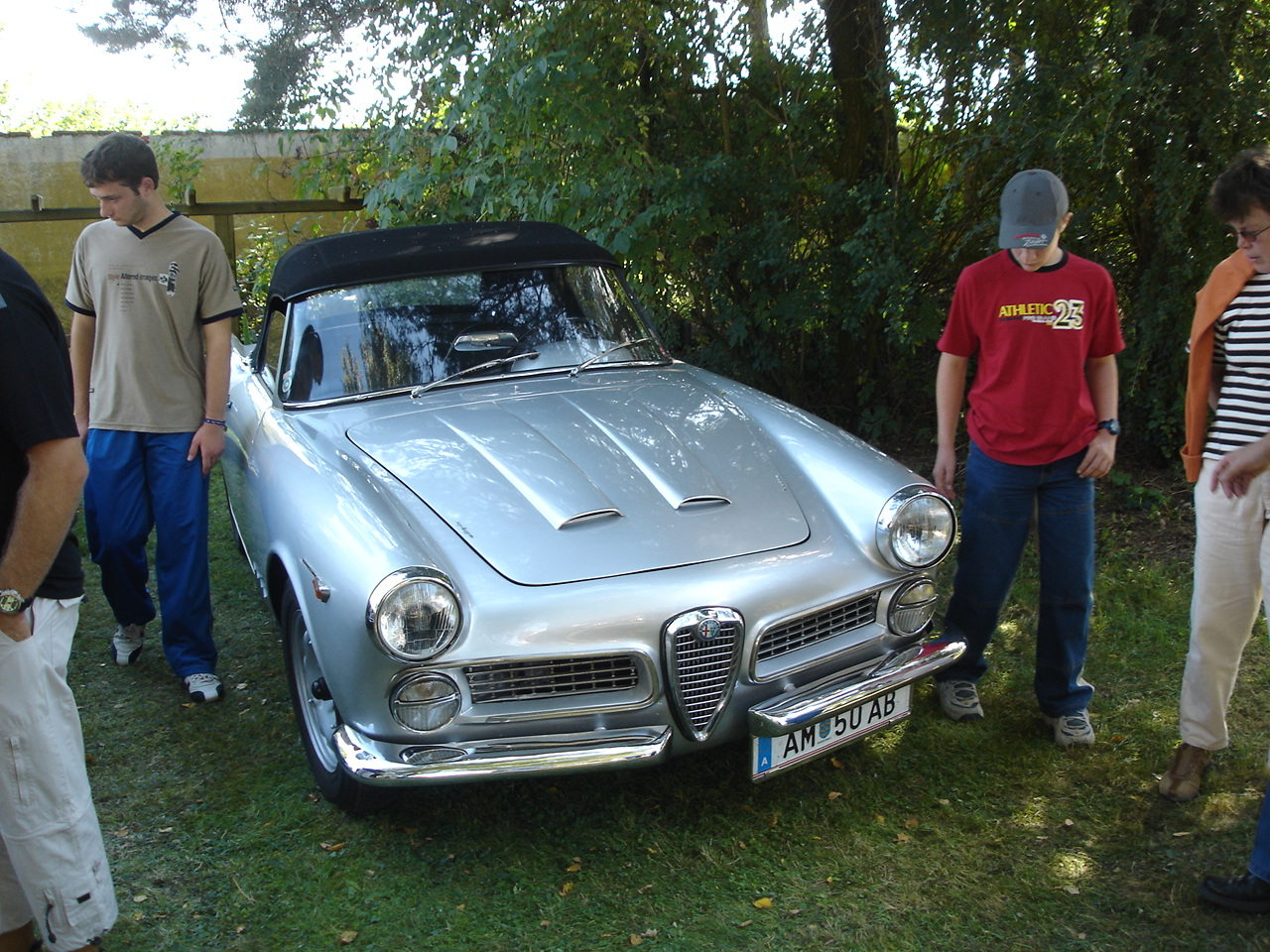 Alfa Romeo 2000 Cabrio in silber